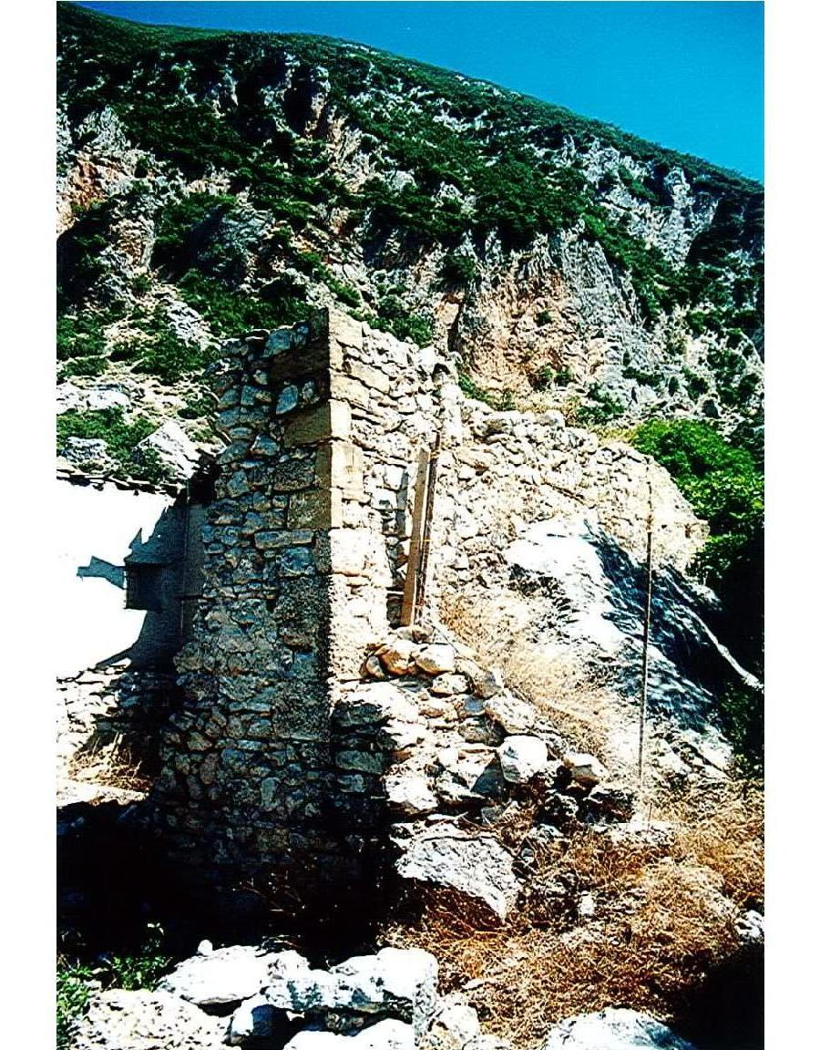 Banesa E Petrit Derrit